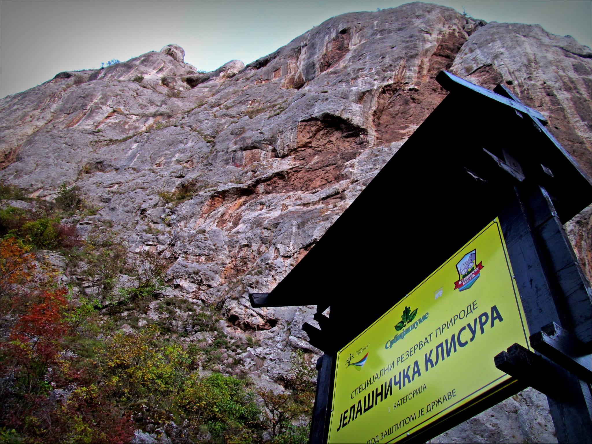 Српски (ћирилица): Јелашничка клисура, алпинистички терени. Нишка Бања, Србија.